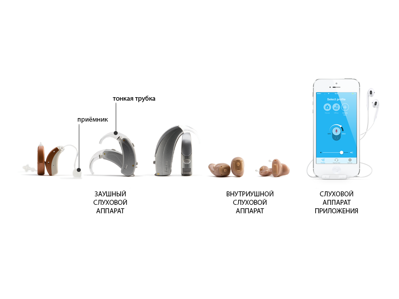 Цифровые слуховые аппараты различных типов (справа - смартфон с гарнитурой)